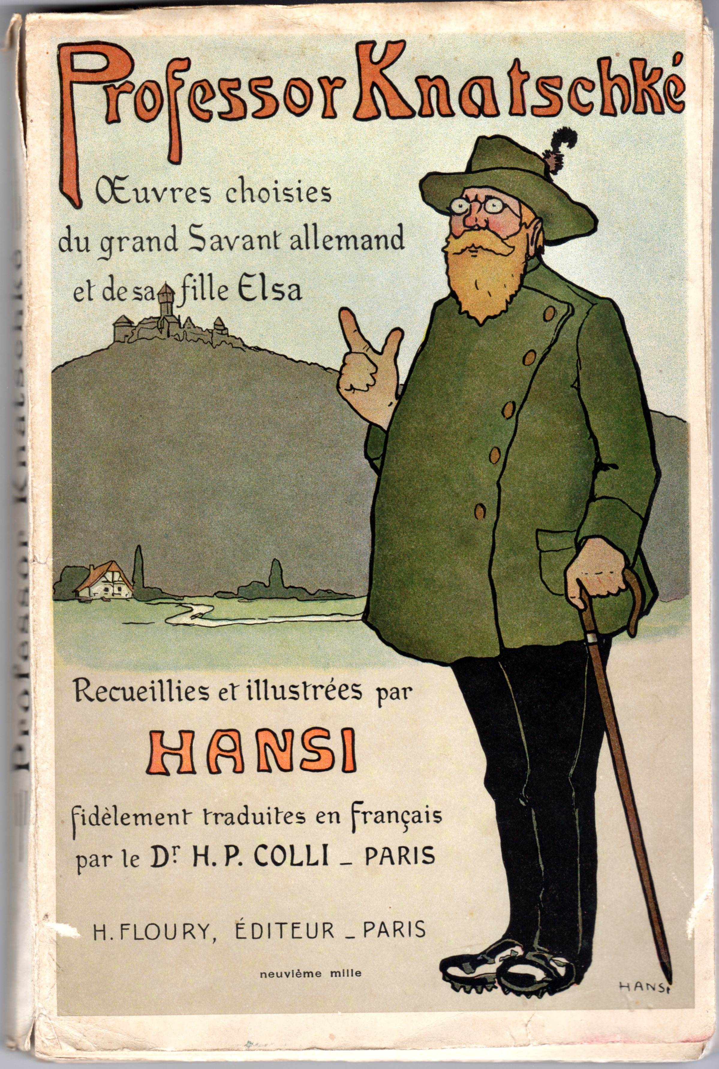 Page de titre du récit humoristique de Hansi, 1912, décrivant l'invasion de l'Alsace par des touristes germaniques